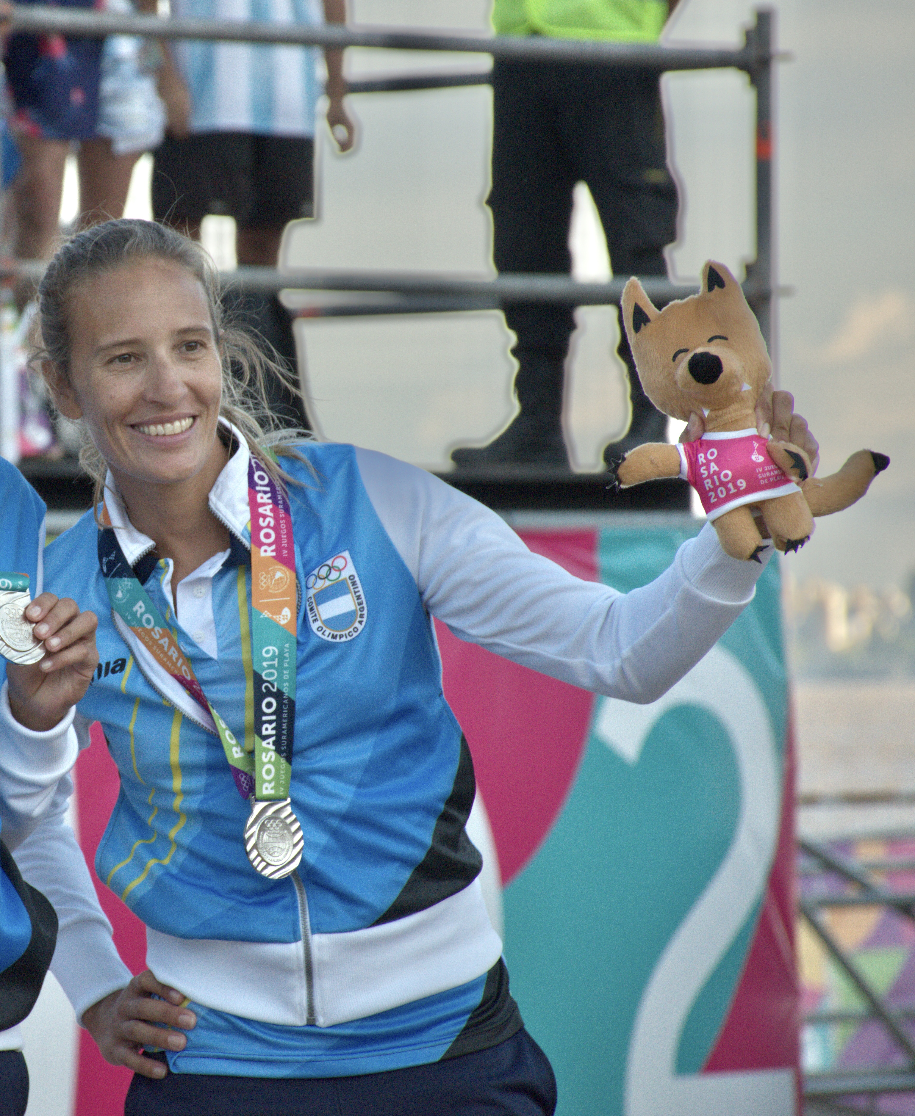 Ceremonia de entrega de medalla a lo ganadores de Voley de Playa femenino en los IV Juegos Suramericanos de Playa